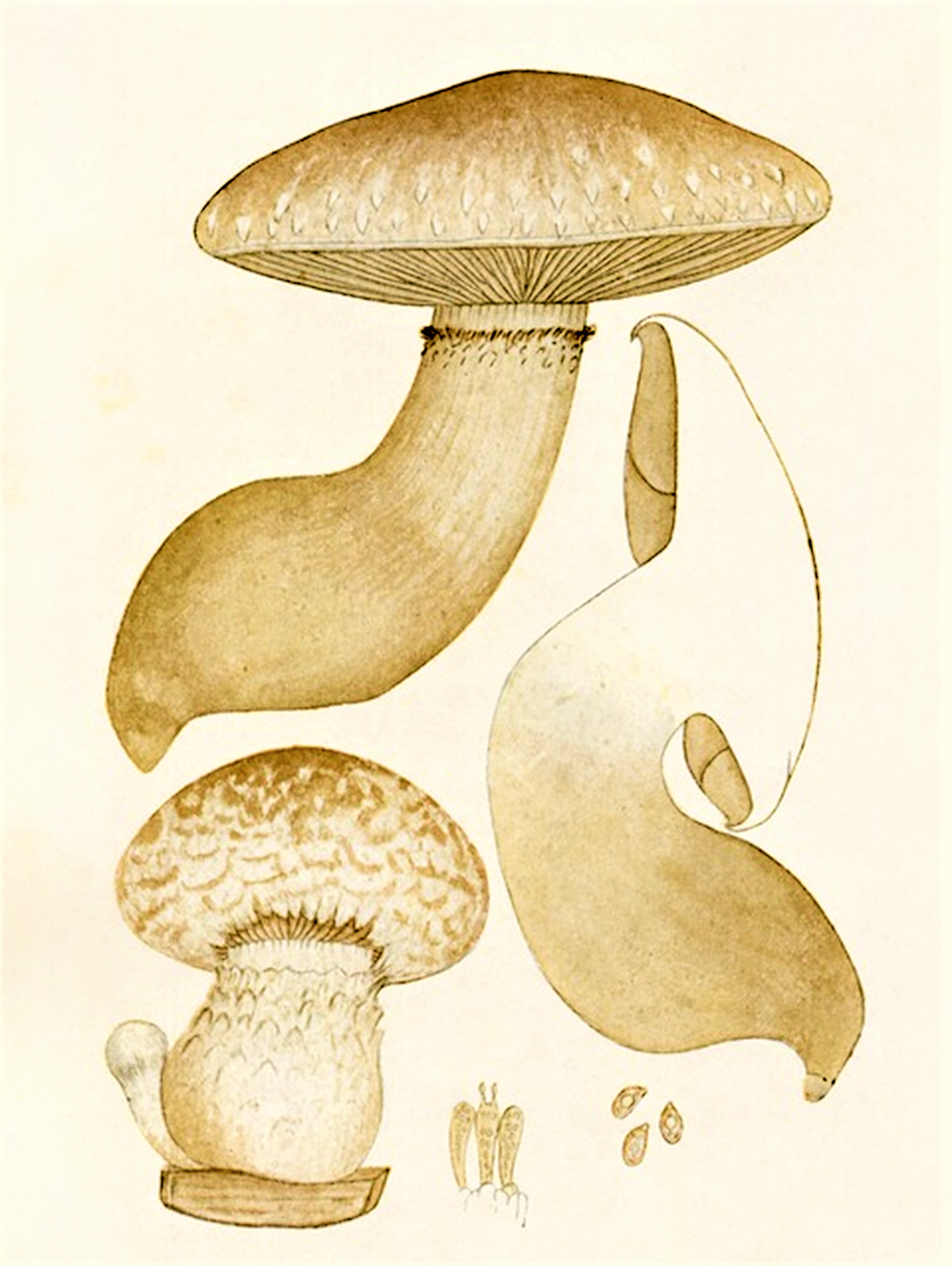 Pholiota destruens (Brond., 1829) Gillet (1876), heute (Pers., 1828) Kuyper & Tjall.-Beuk. (1986), nicht Hemipholiota populnea (Pers.) Bon (1986)![1][2]